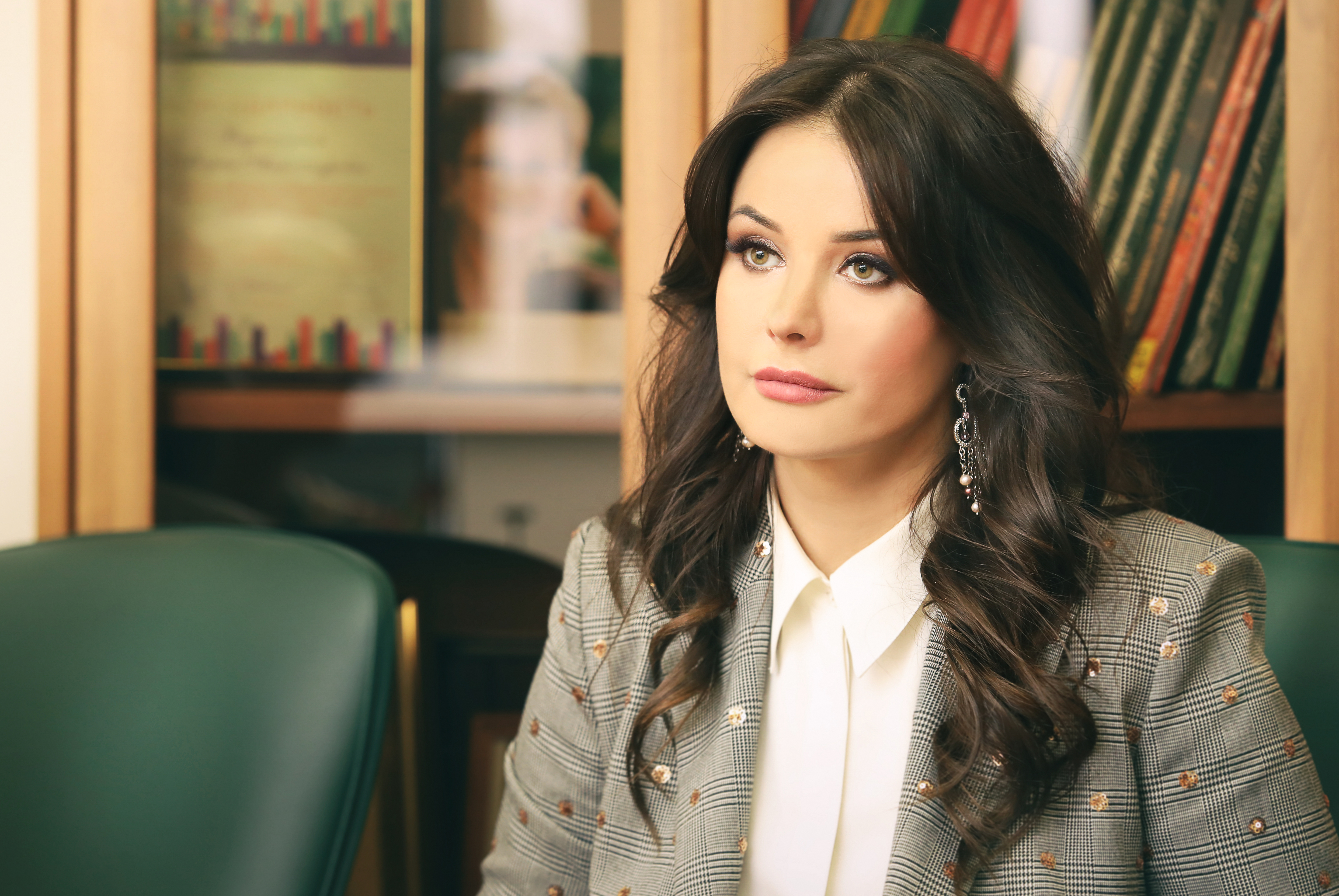 Российская телеведущая, актриса Оксана Фёдорова в Российской государственной детской библиотеке.